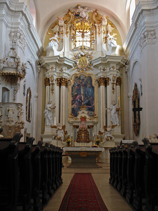 Kežmarok - Kostol Navštívenia Panny Márie